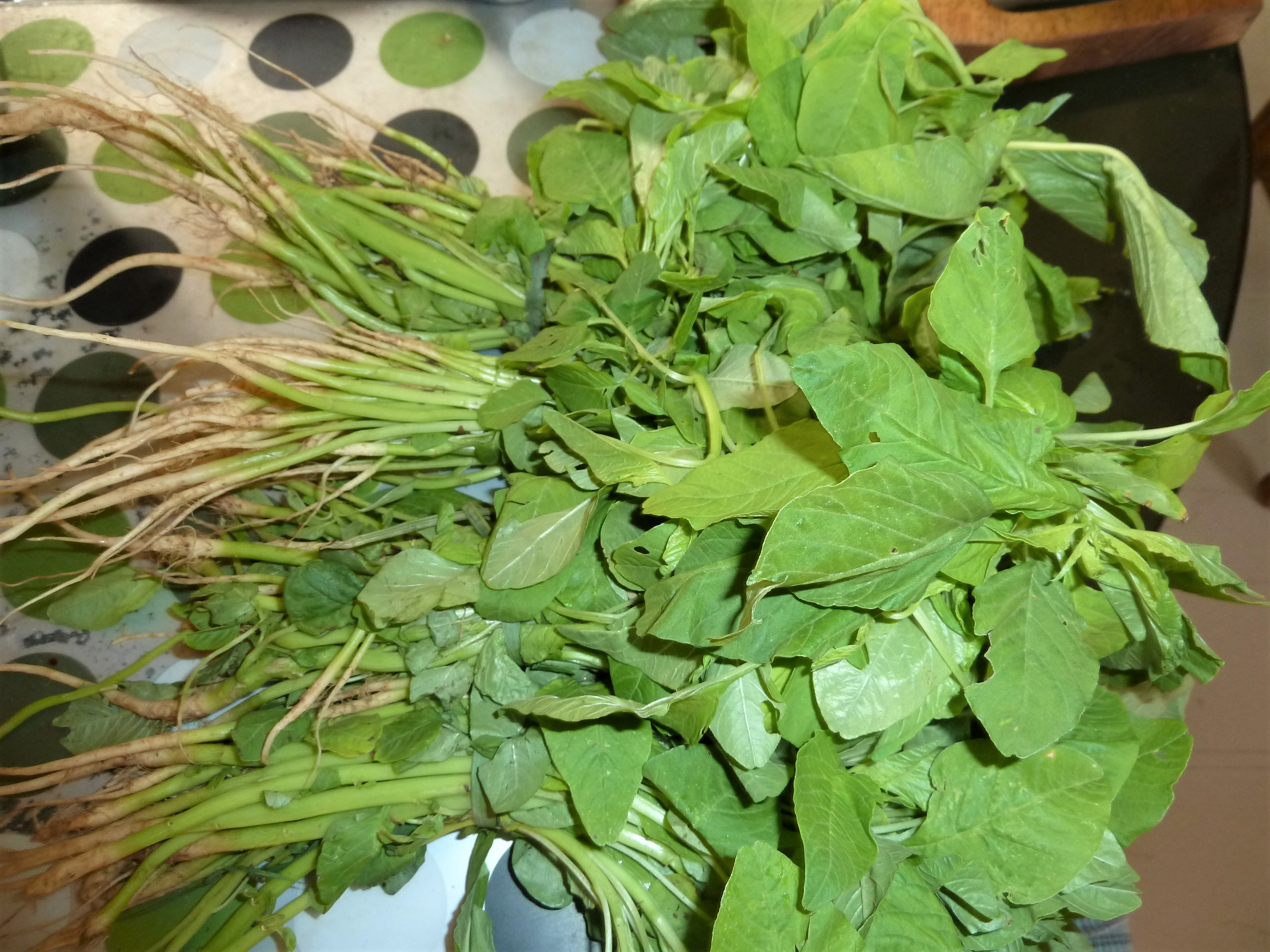 తోటకూర